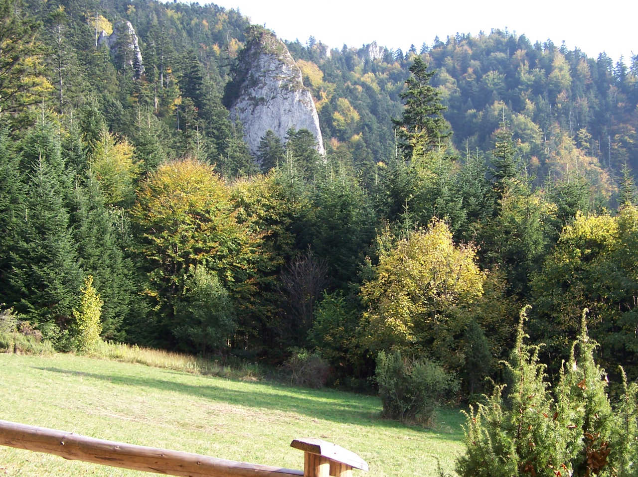 Kopa Siana (Pieniny)